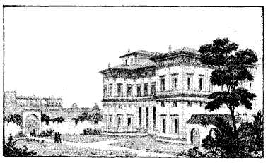 Villa Farnesina in Trastevere, Rome